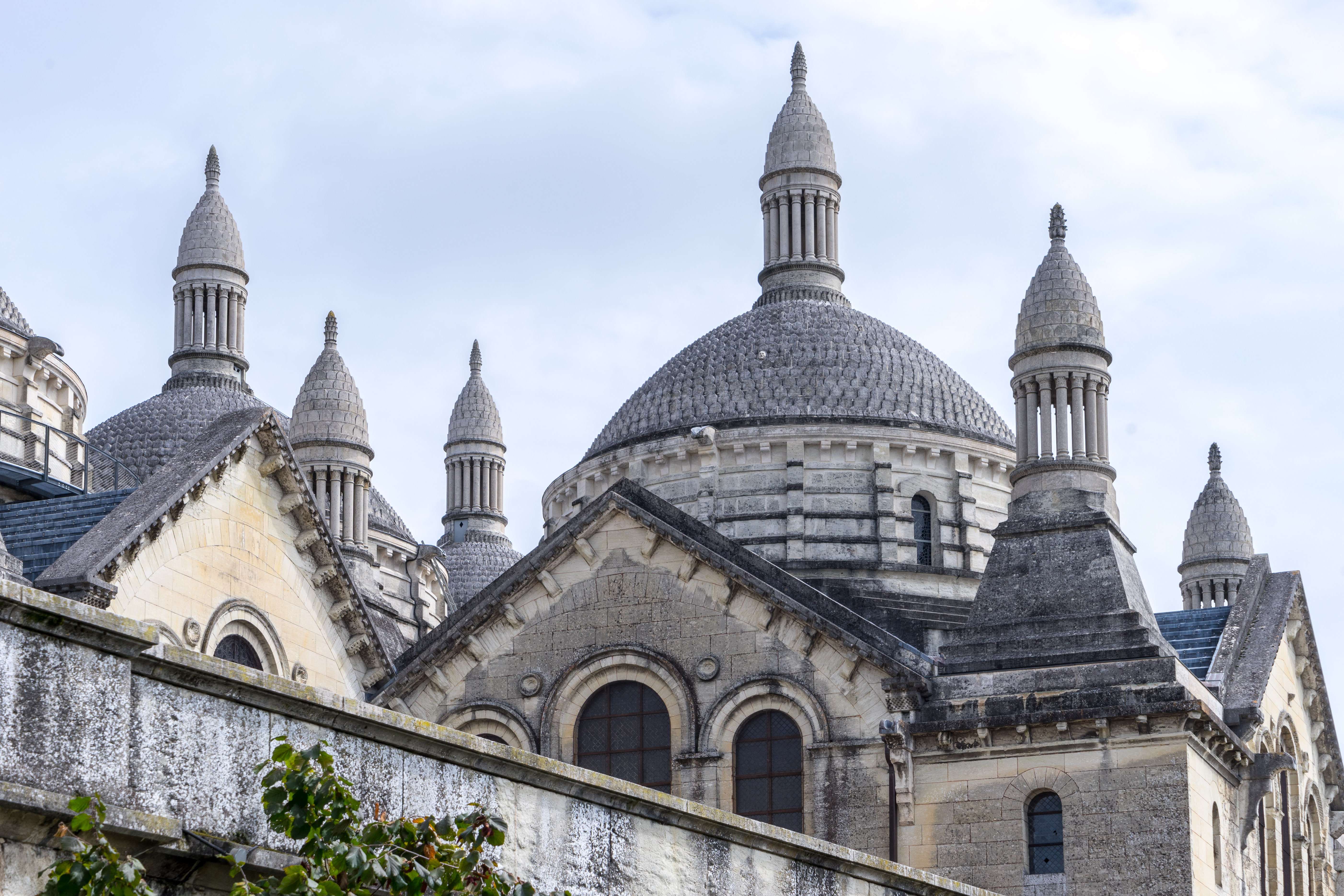 Périgueux - Saint-Front - Clochetons